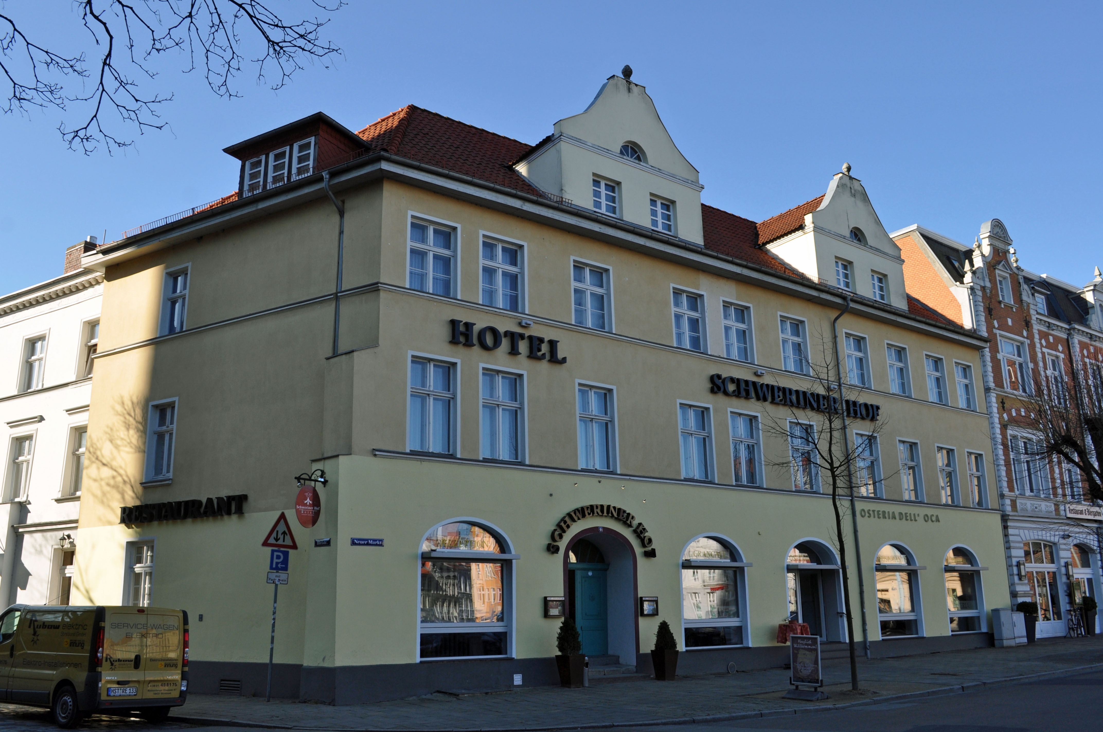 Gebäude bzw. Gebäudedetail in Stralsund. Straße und Hausnummer siehe Dateiname. Das Gebäude ist als Baudenkmal ausgewiesen, siehe dazu die Liste der Baudenkmale in Stralsund.